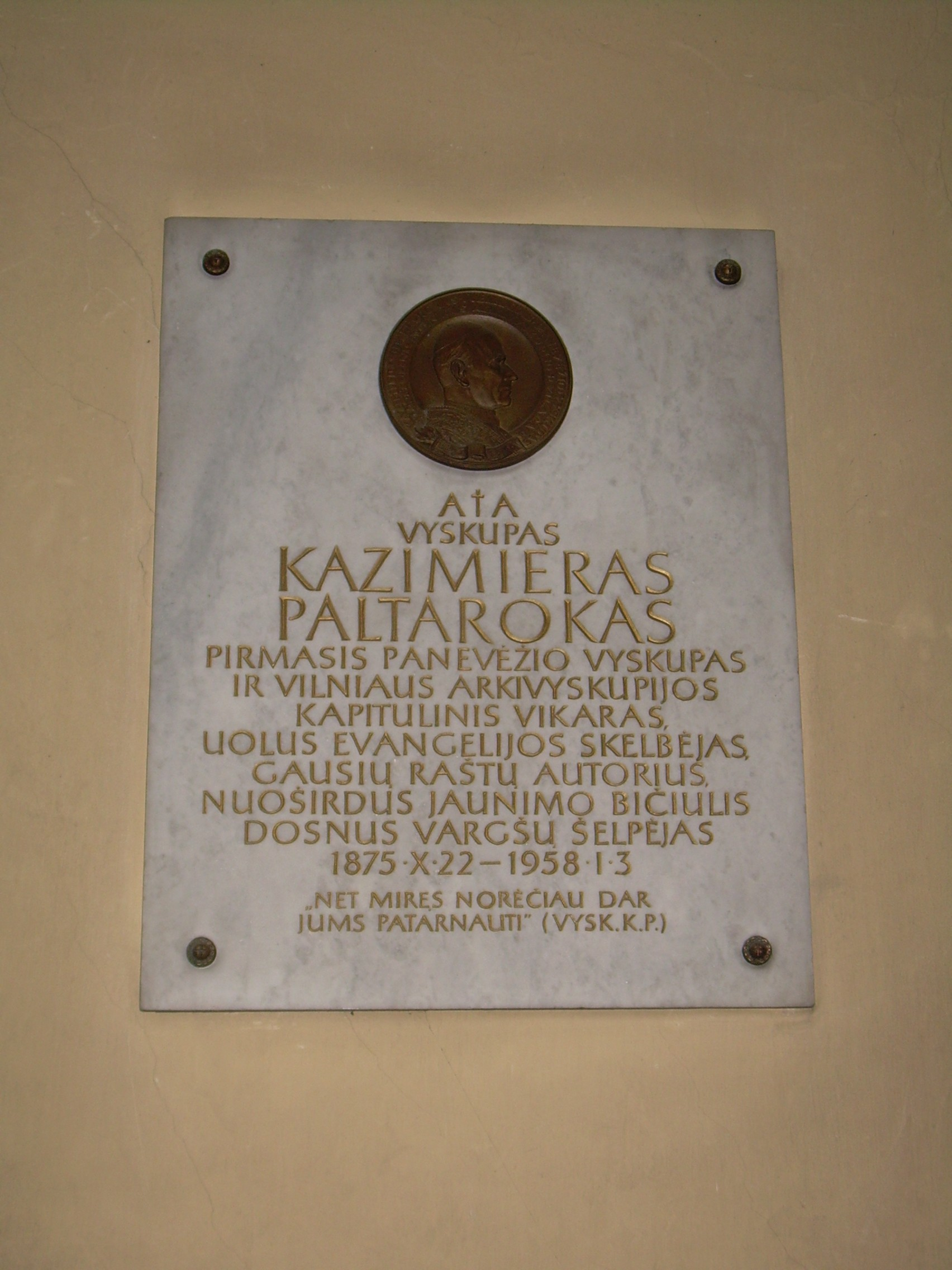 Šeduvos Šv. Kryžiaus Atradimo bažnyčia